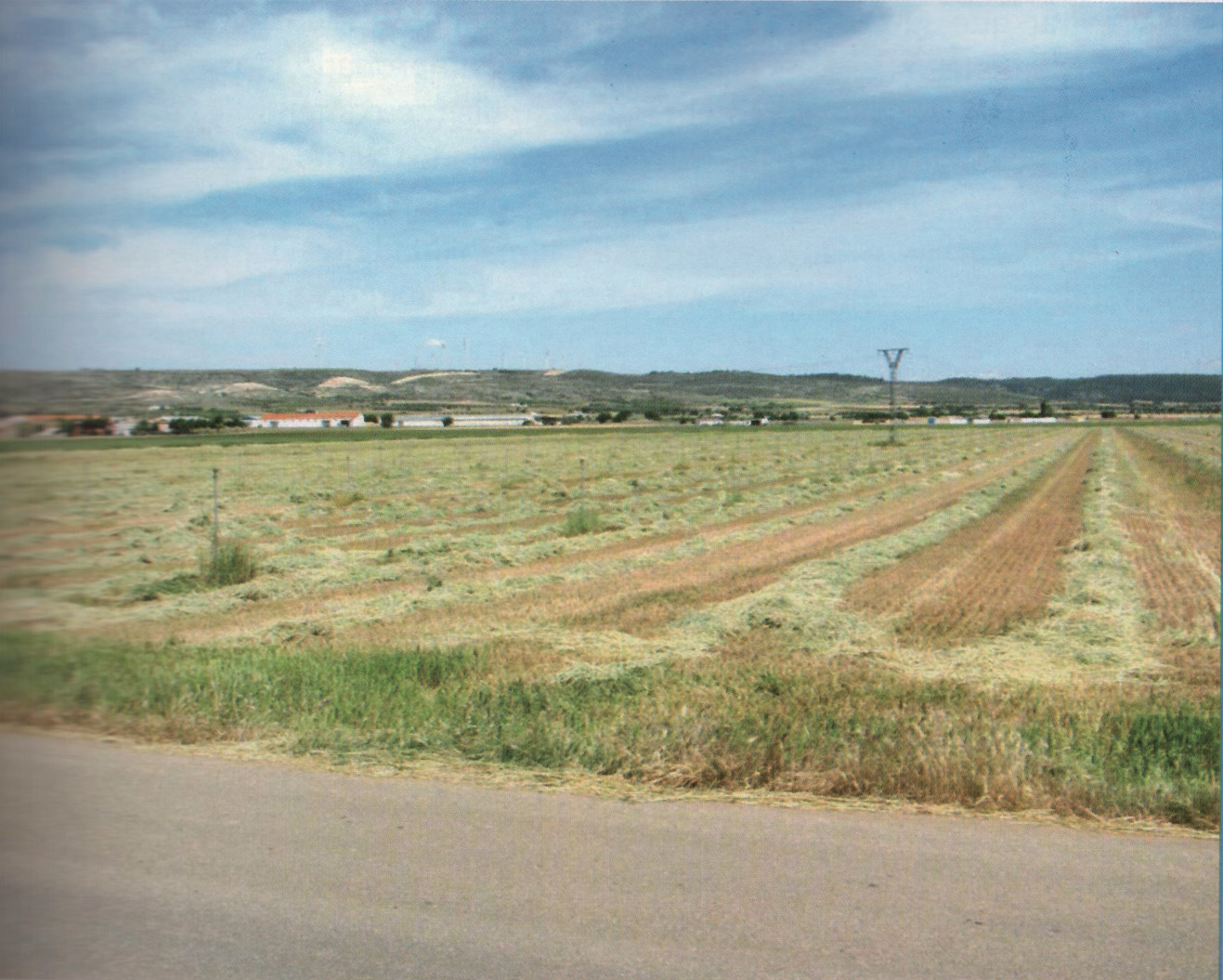 Campo de aviación del Aeródromo de Sisante en la actualidad